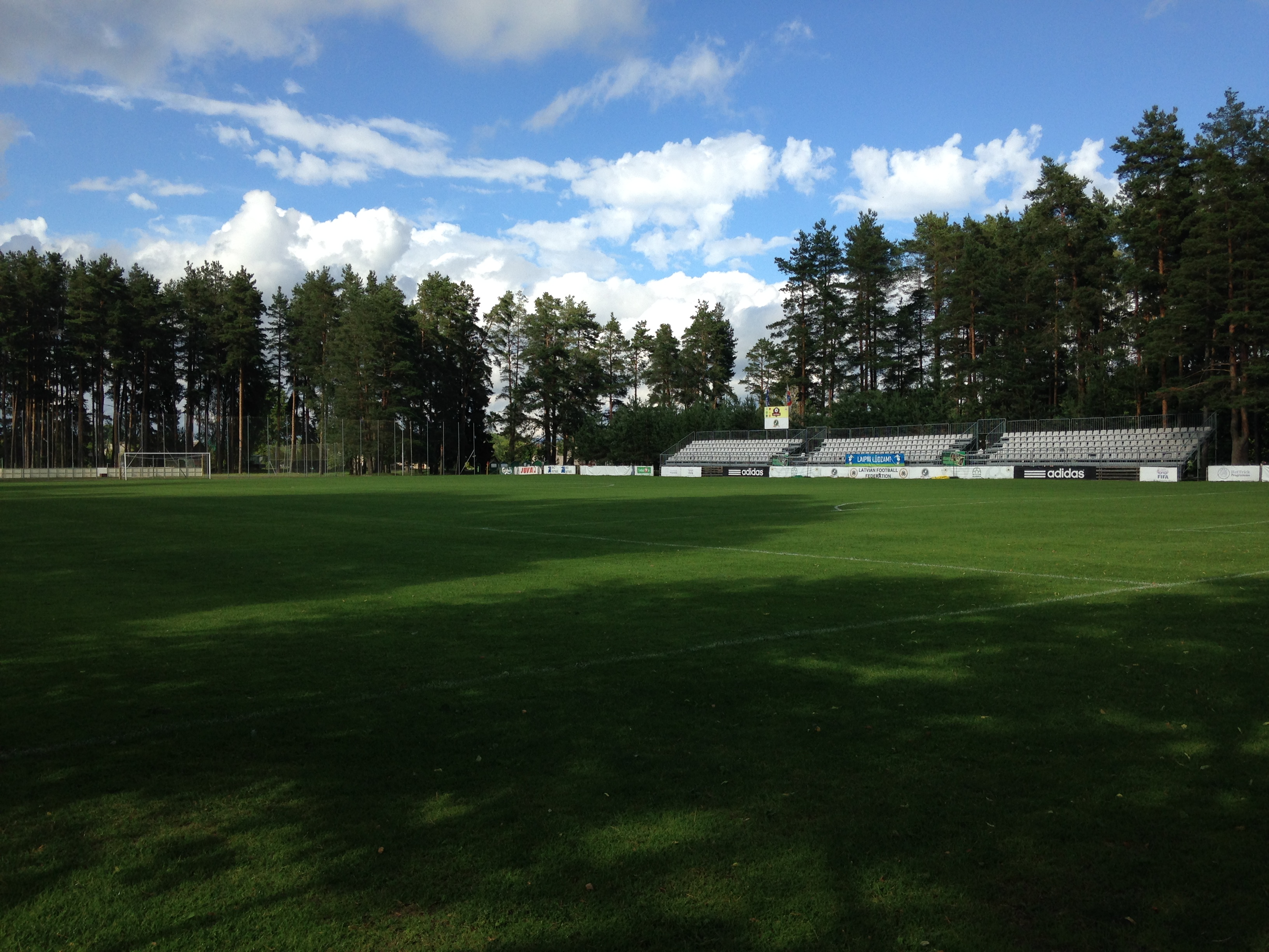 Galvenais stadions LFF mācību un treniņu centrā "Staicele", 11.07.2016